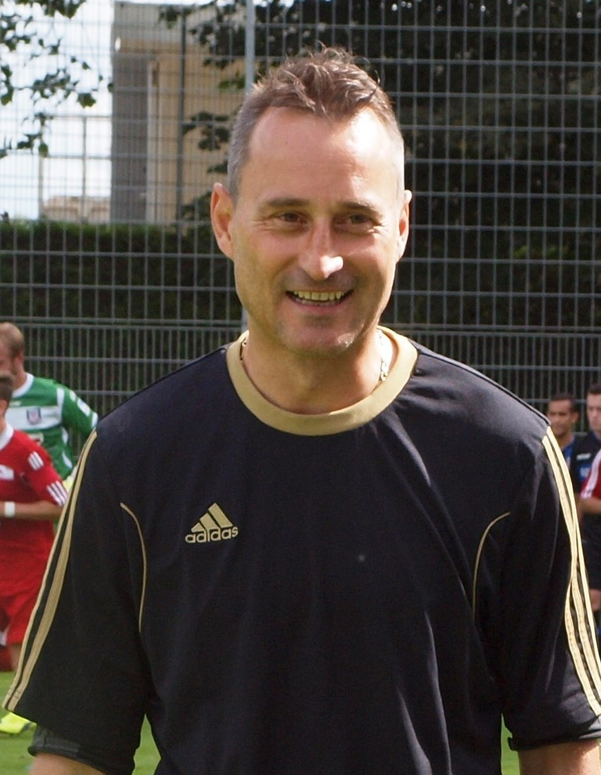 Georgi Donkov